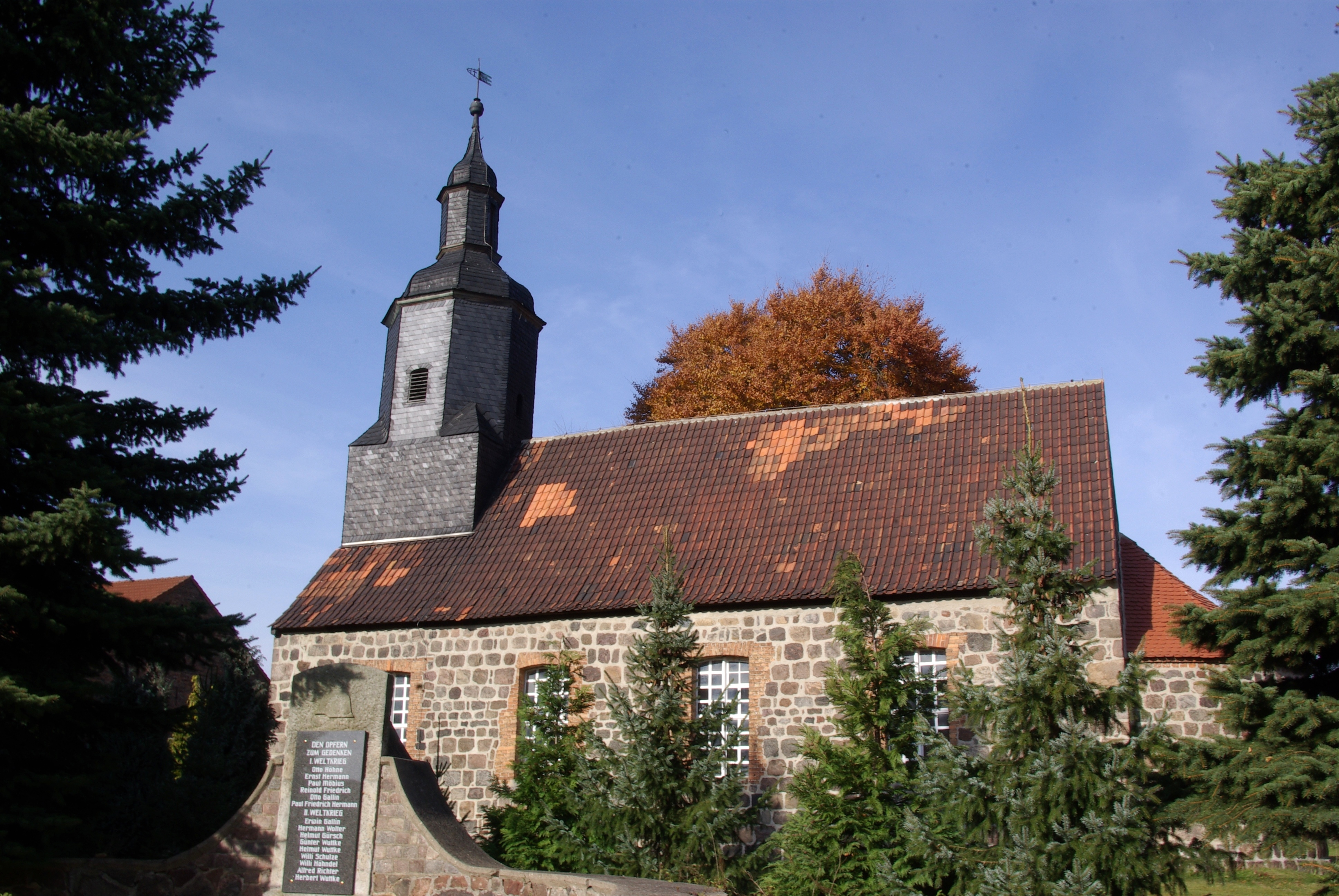 Nidergörsdorf Ortsteil Eckmannsdorf in Brandenburg. Die Kirche steht unter Denkmalschutz.